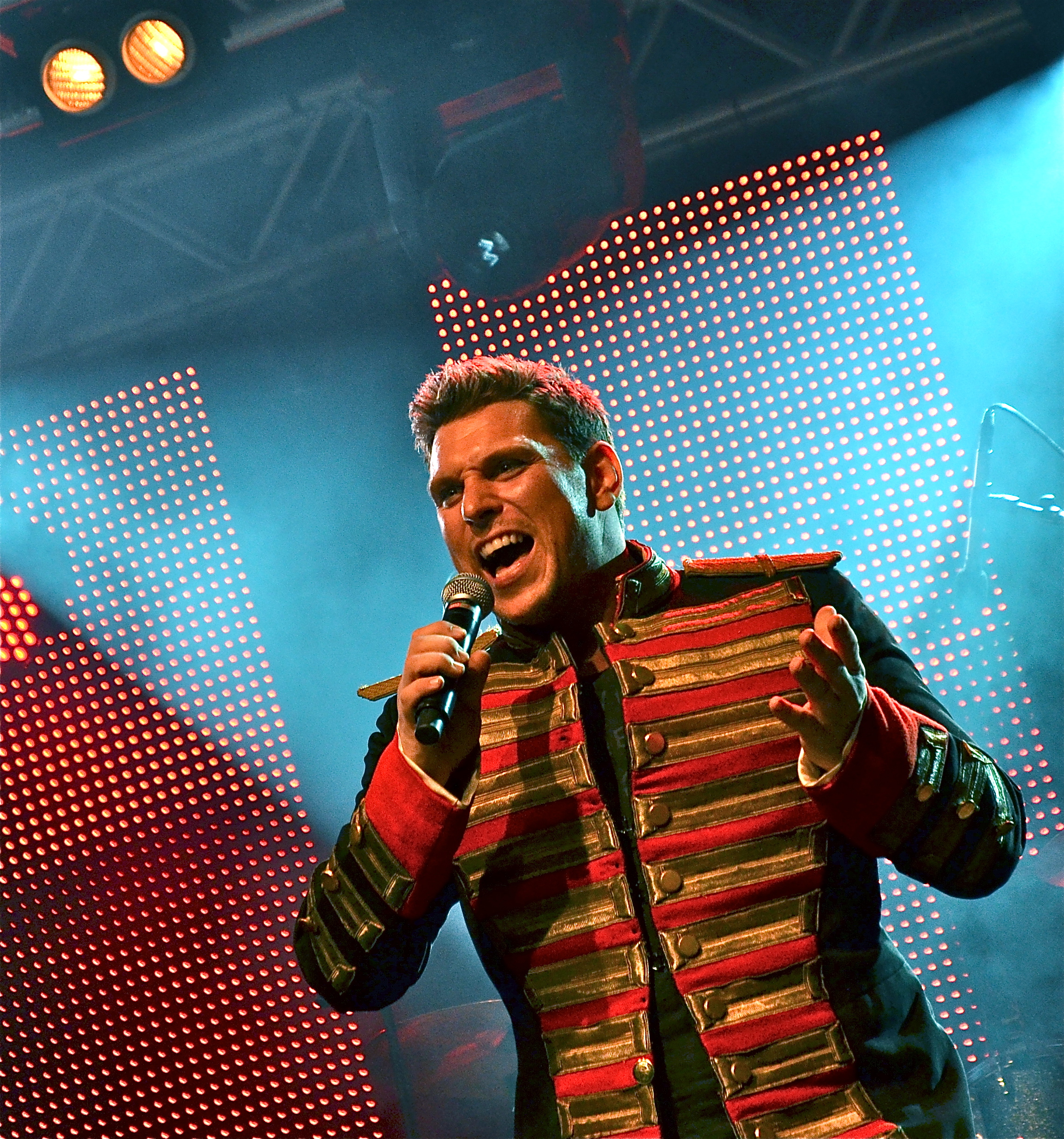 Jonas_Hedqvist_på_Stockholm_Pride_6_aug_2011